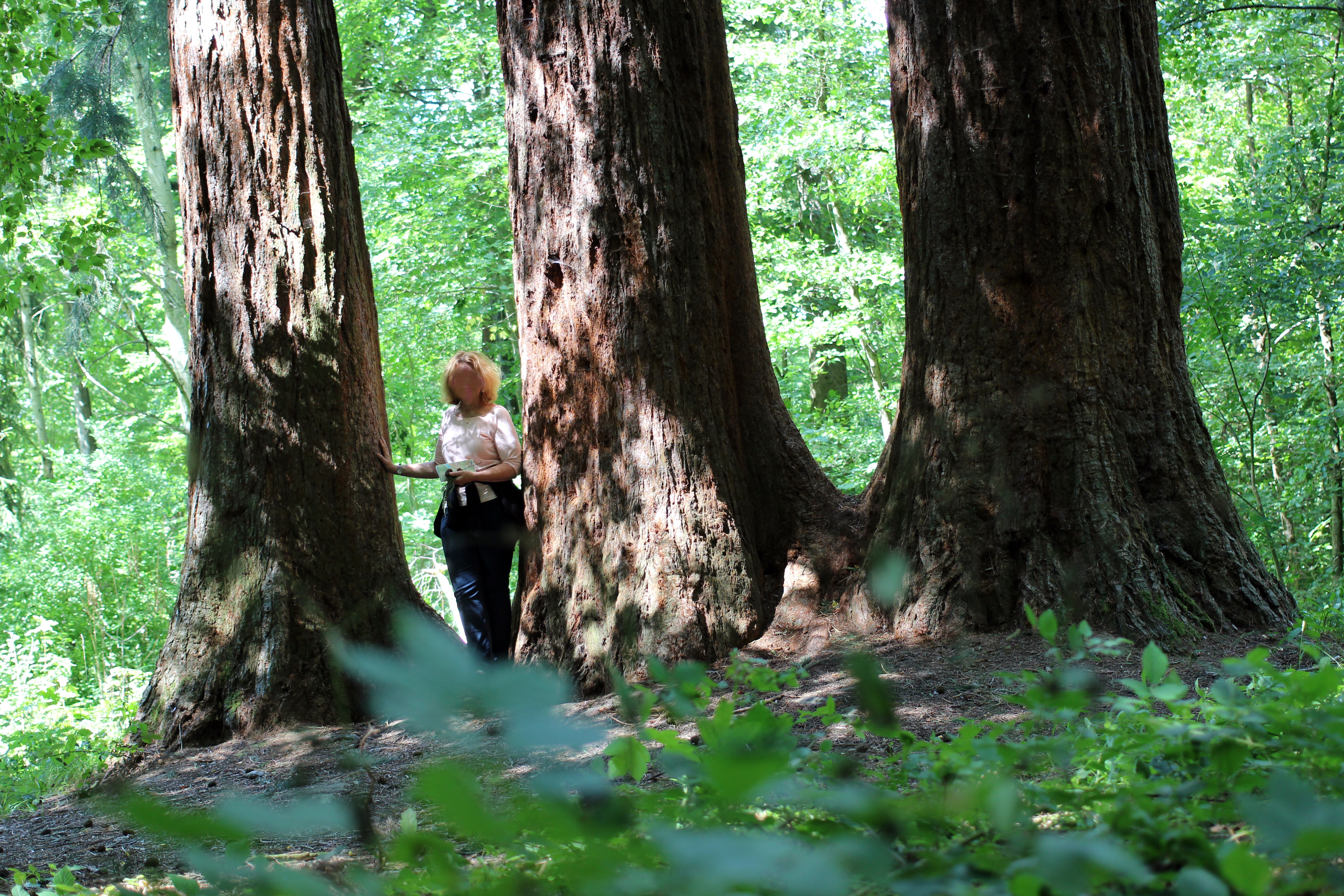 Die drei nebeneinander gepflanzten Mammutbäume am Weißen Häusle. Die Frau misst 1,76 m. Die Bäume befinden sich direkt am Weißen Häusle, wenige Meter entfernt von der Kreuzung Dettenhäußer Weg/Siebenbuchenwasensträßchen